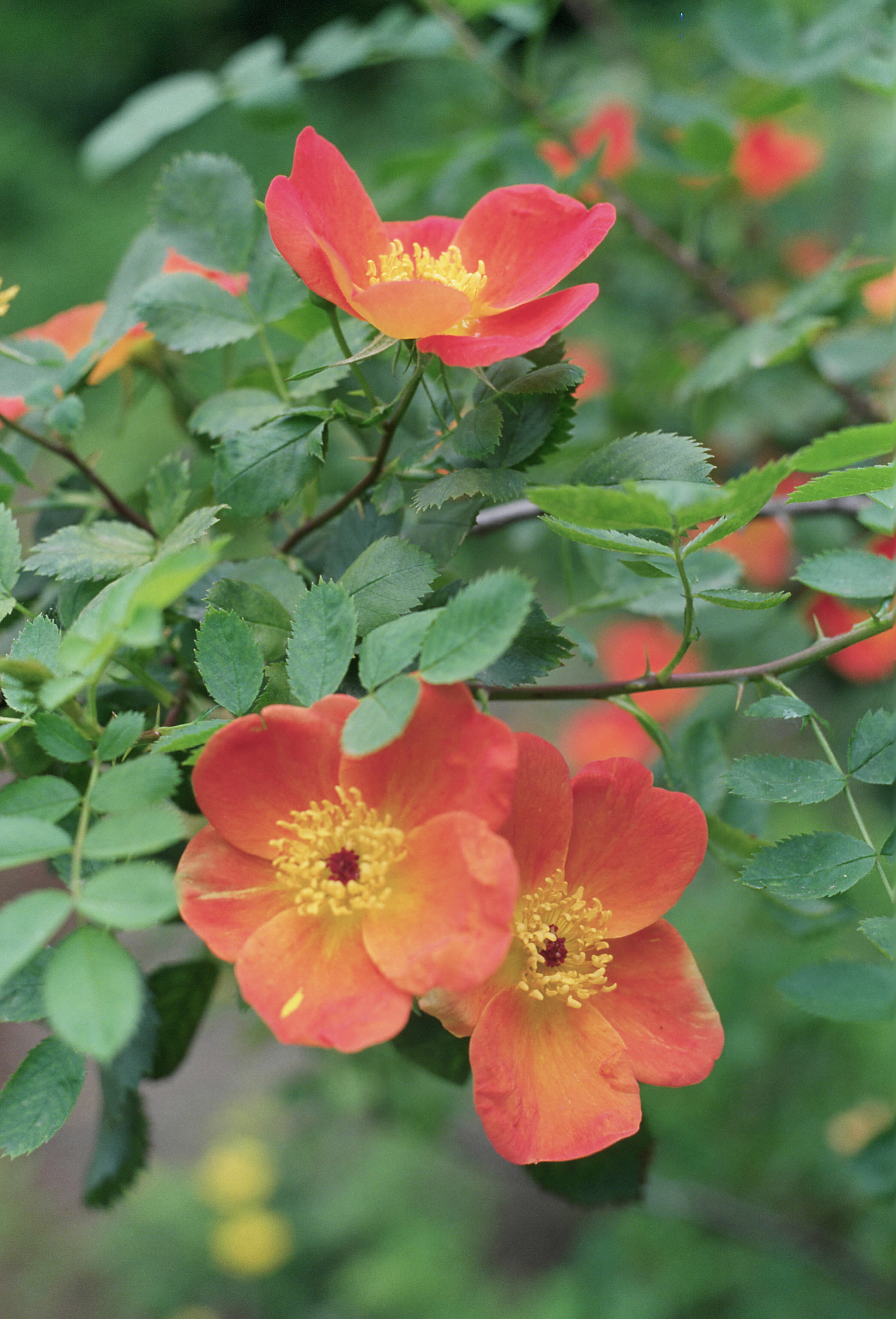 Rosa foetida 'Bicolor', sect. Pimpinellifoliae. Real Jardín Botánico, Madrid